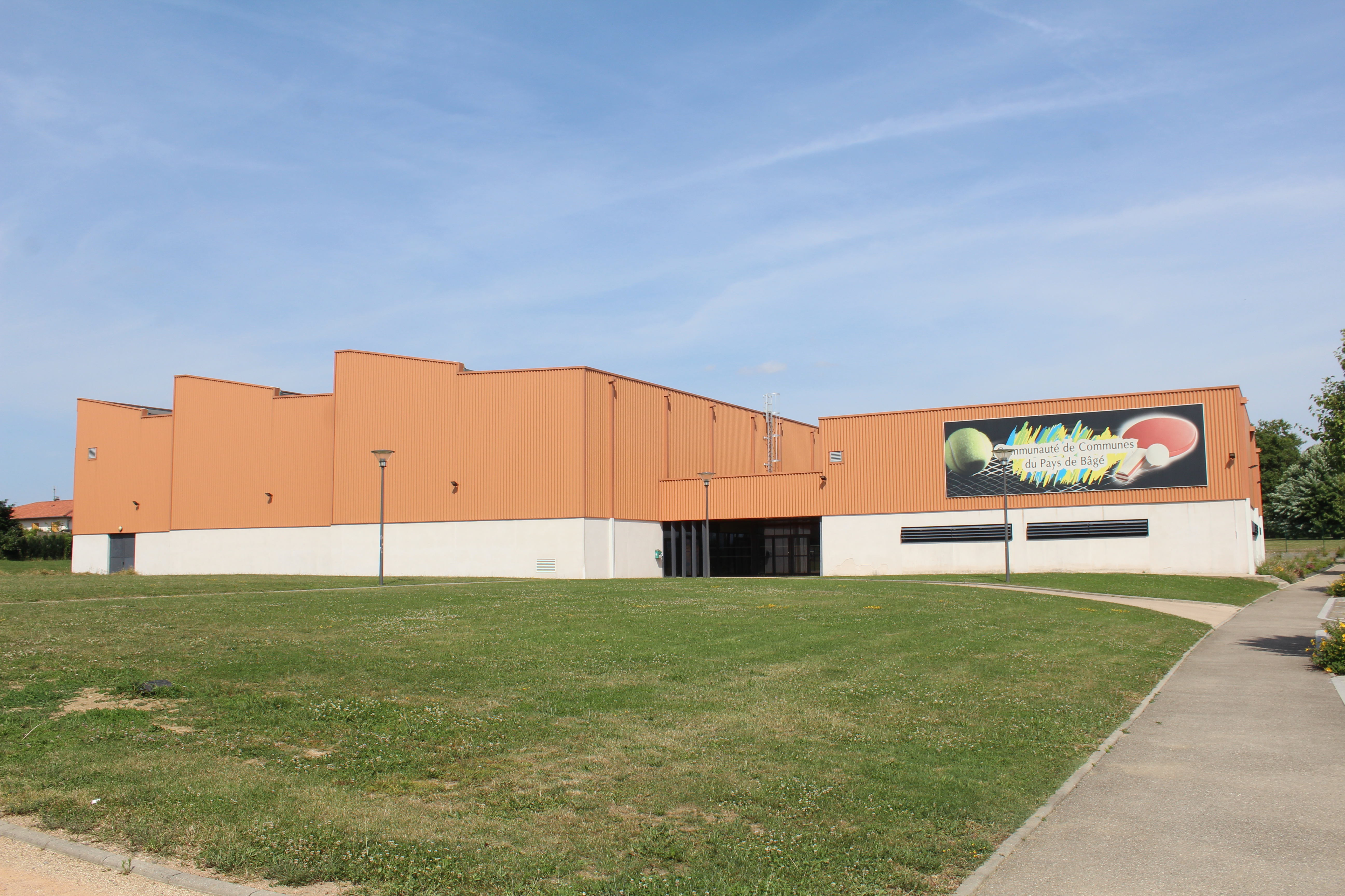 Courts de tennis intérieurs à Feillens.